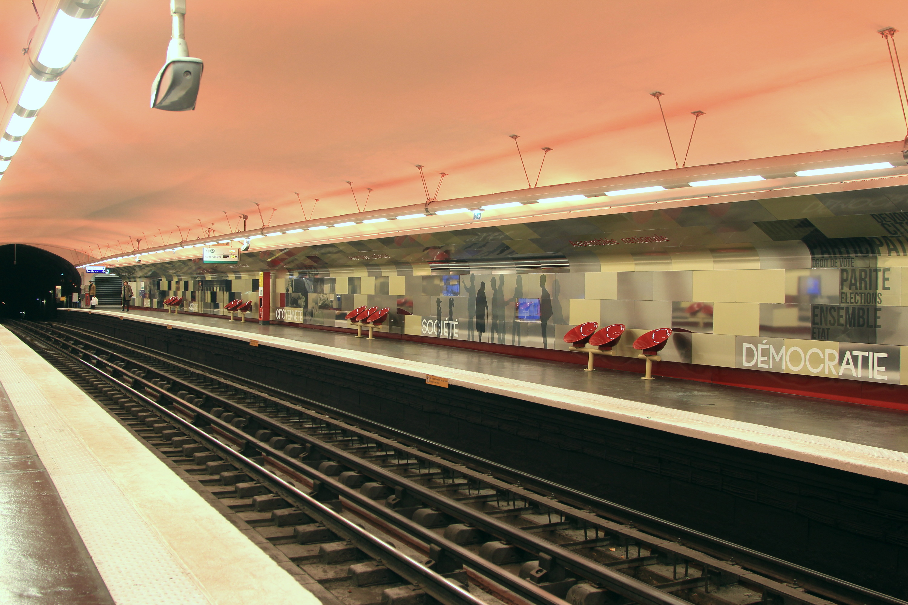 Quai direction Aubervilliers de la station de métro parisien Assemblée Nationale.